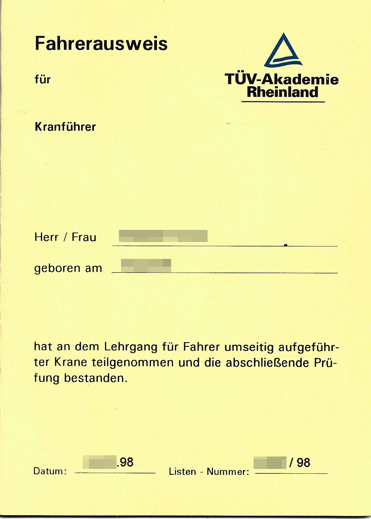 Fahrerausweis für Kranführer, TÜV-Akademie Rheinland, Seite 1